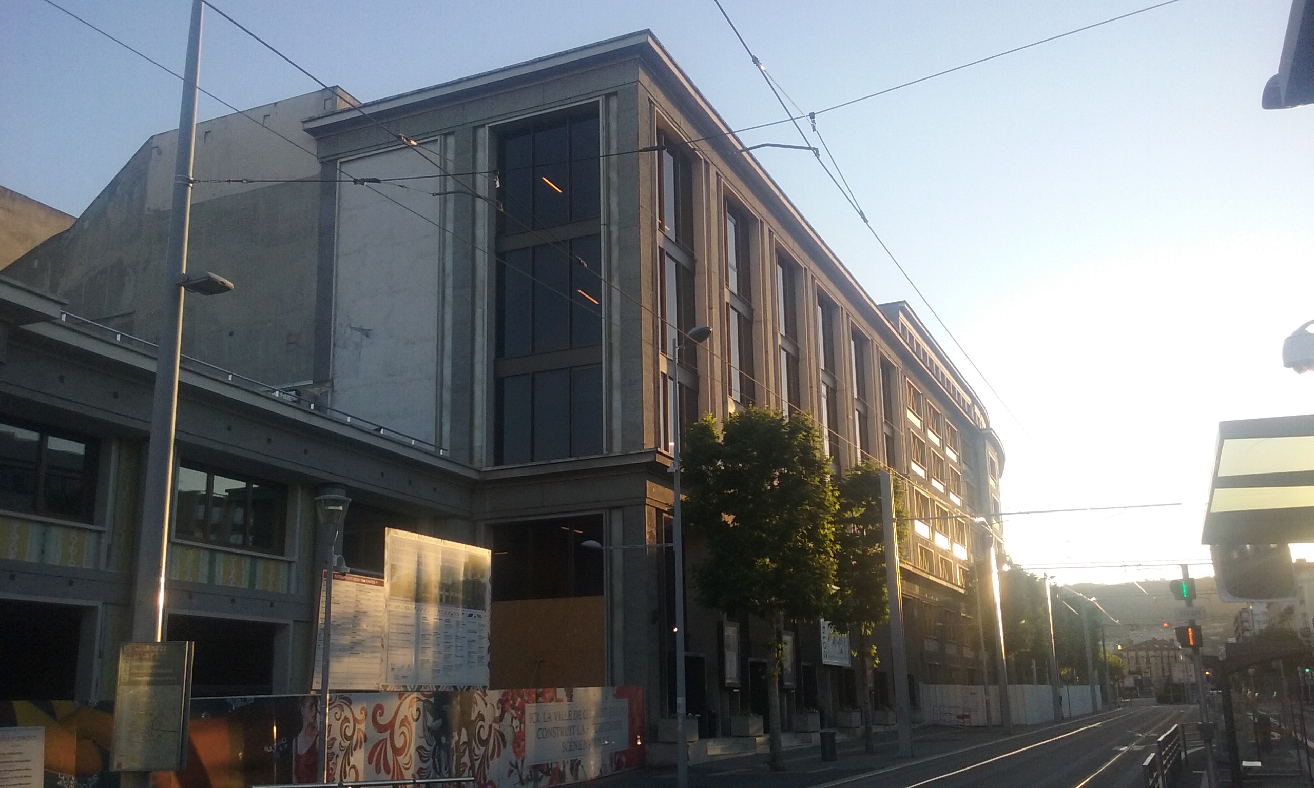 Comédie de Clermont-Ferrand (travaux 2019) - Puy-de-Dôme, Auvergne.